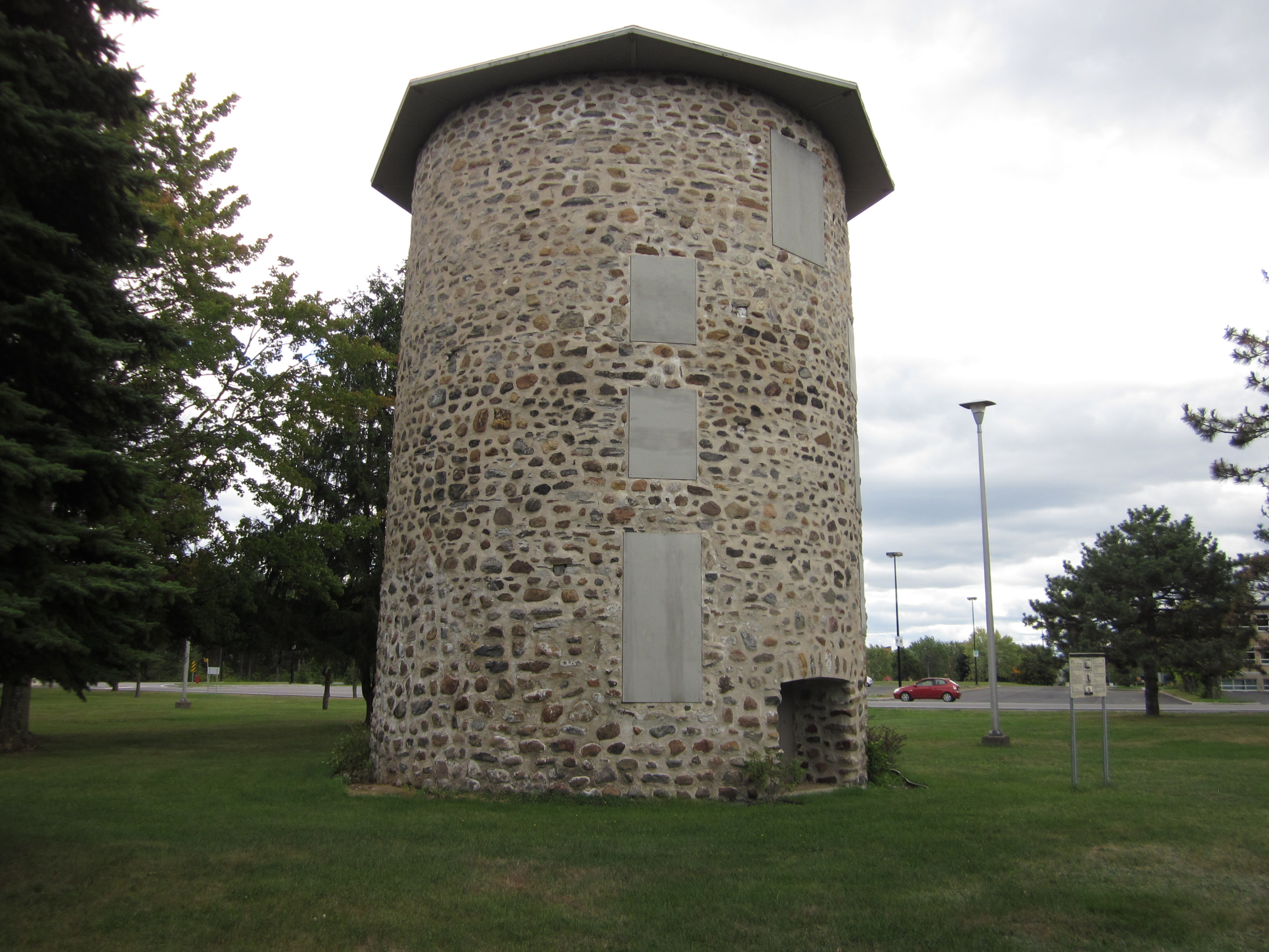 Moulin à vent de Trois-Rivières, 3351, boulevard des Forges, Trois-Rivières (Canada). (Protection MH classé. Voir la liste des lieux patrimoniaux de la Mauricie pour plus de détails).